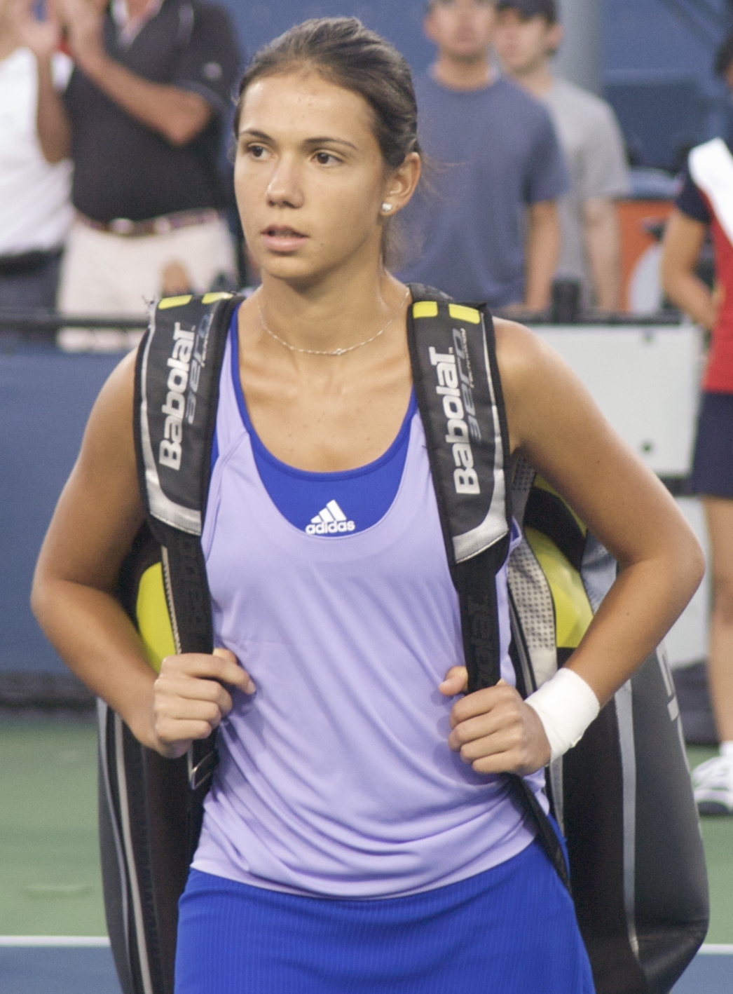 Ioana Raluca Olaru at the 2009 US Open